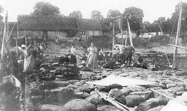 "Hamnarbete i Vik när seklet var ungt"